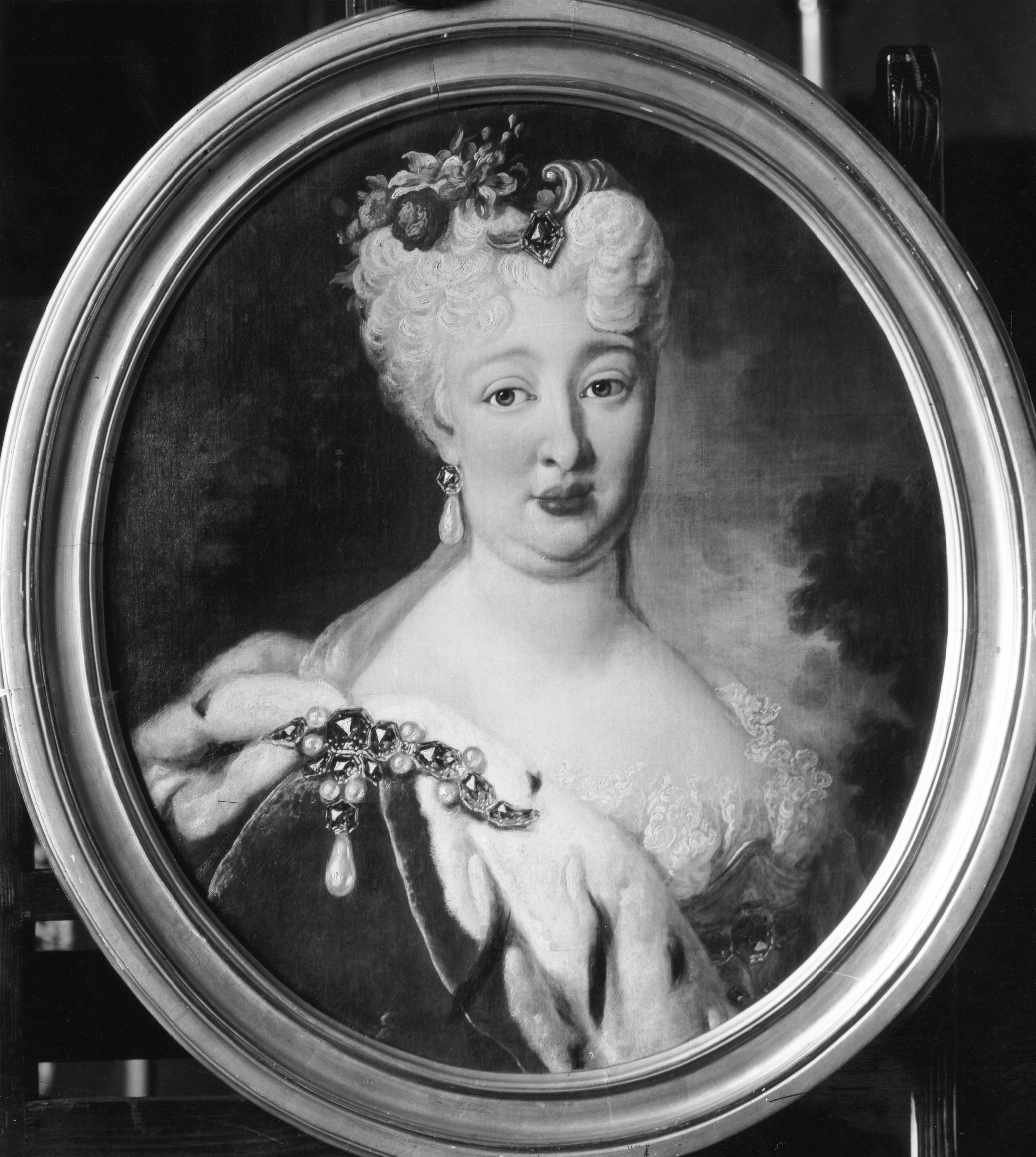 Elisabeth Auguste Sofie von der Pfalz (1693-1728). Sie war eine Tochter des Pfälzischen Kurfürsten Karl Philipp aus der Linie Pfalz-Neuburg und von dessen erster Gemahlin Ludwika Karolina Charlotte von Radziwiłł-Birze und Mutter der späteren Kurfürstin Elisabeth Auguste von Bayern (1721 - 1794).